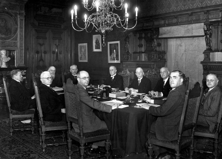 Nederland, vierde kabinet Colijn (1937 - 1939). De Wilde, Van Dijk, Slotemaker de Bruïne, Van Boeyen, Van Buuren, Goseling, Colijn, Welter, Steenberghe, Romme.